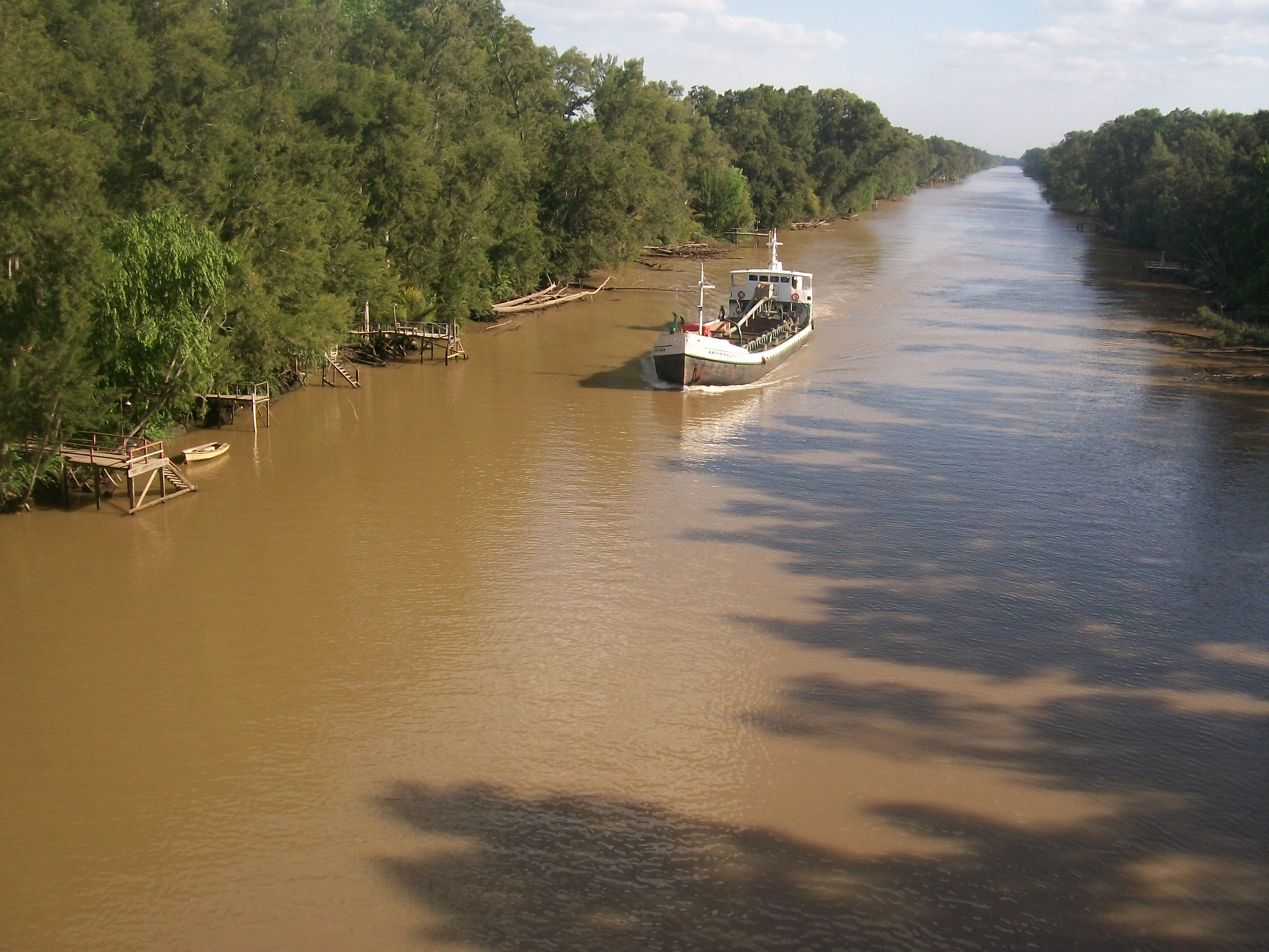 Canal Gobernador Arias, delta del río Paraná, Buenos Aires, Argentina. En la fotografía cruce con el buque arenero Antonino Cascio.